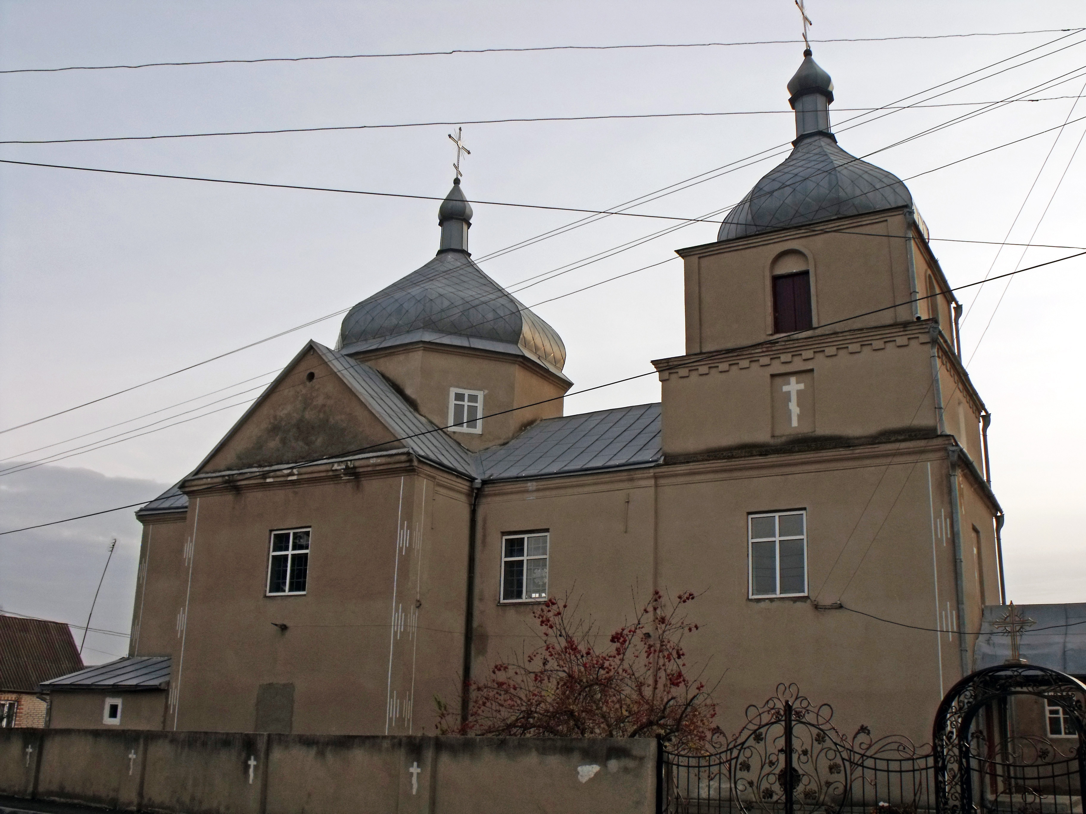 Церква Св.Вознесіння, Хмільник, вул.Шевченка, 36